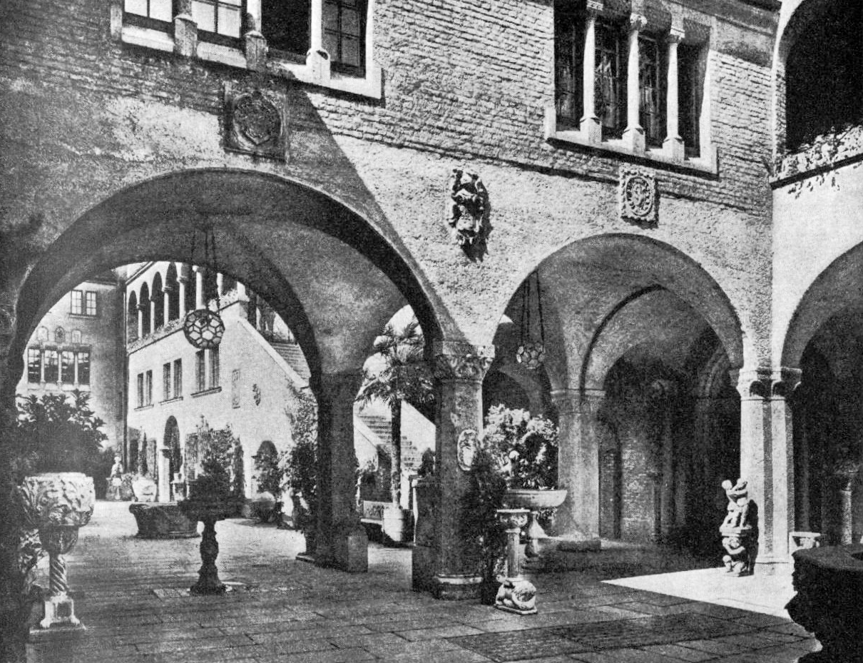 Bernheimer Palais, München. Der Hof im italienischen Stil, errichtet mit dem Neubau 1909/10